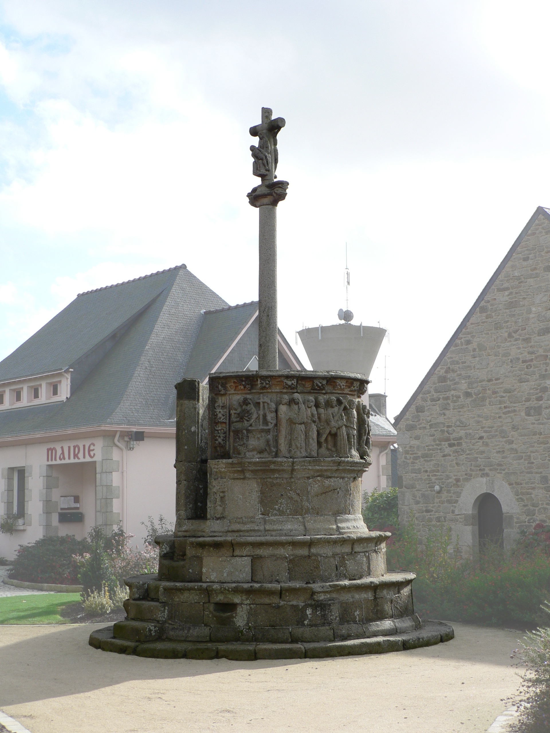 Calvaire chaire extérieure (XVe siècle), Pleubian, Bretagne (France). Mairie (town hall) in the background.